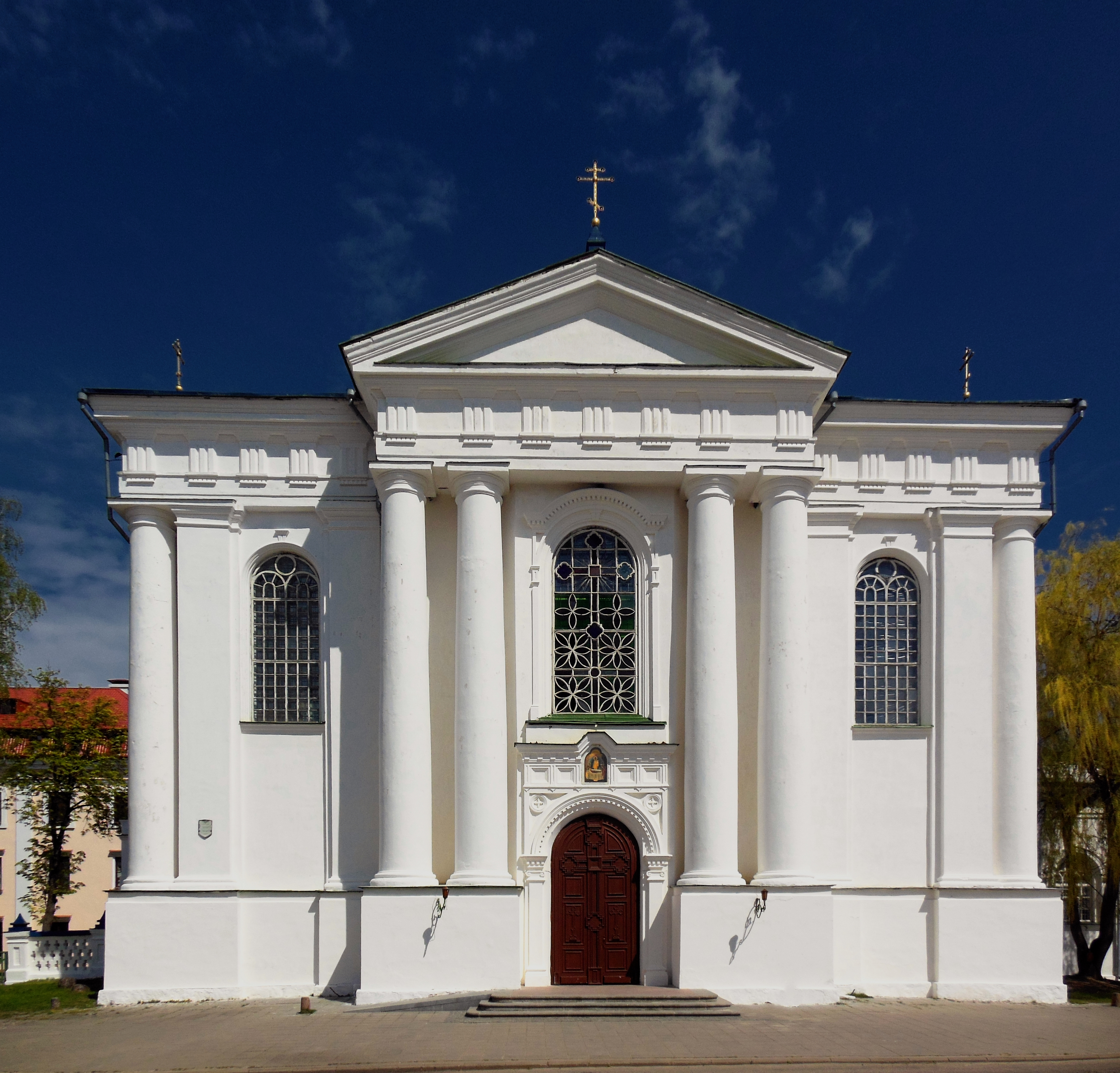 Беларуская (тарашкевіца): Ансамбаль Сьвята-Усьпенскага манастыра: Усьпенскі сабор дэкаратыўнае аздабленьне: росьпіс у консе «Спас Пантакратар», арнамэнтальны дэкор на скляпеньнях паўднёвай сакрысьціі і ўсіх нэфаў, іканастас, бакавыя алтары Богаяўленская царква Крыжаўзьвіжанская царква званіца будынак сэмінарыі жылы корпус гаспадарчыя пабудовы. в. Жыровічы This is a photo of Belarusian heritage monument. Reference number: 411Г000537 ( WLM)